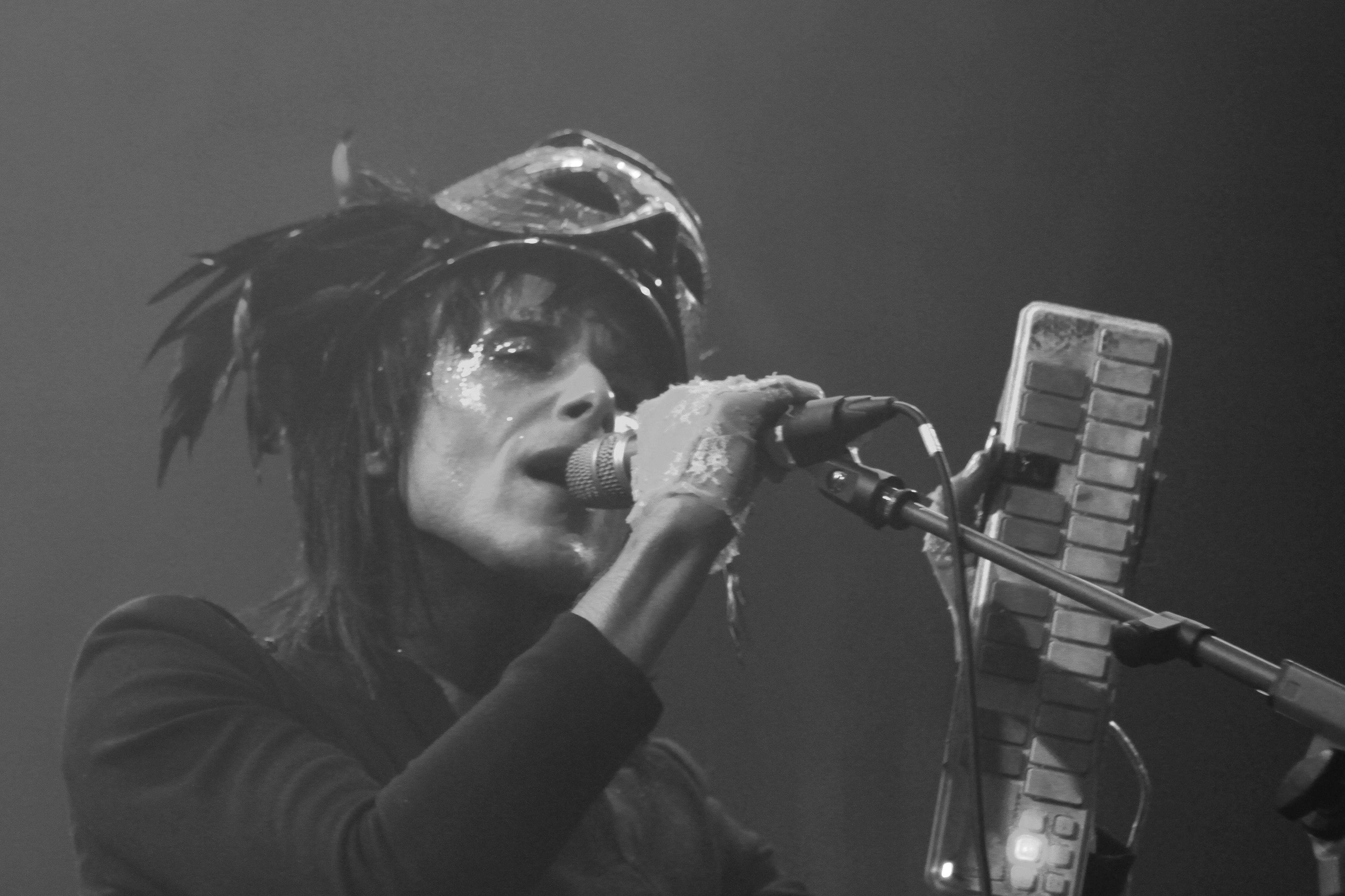 IAMX auf dem Wave-Gotik-Treffen 2013 in Leipzig, Agra-Halle.